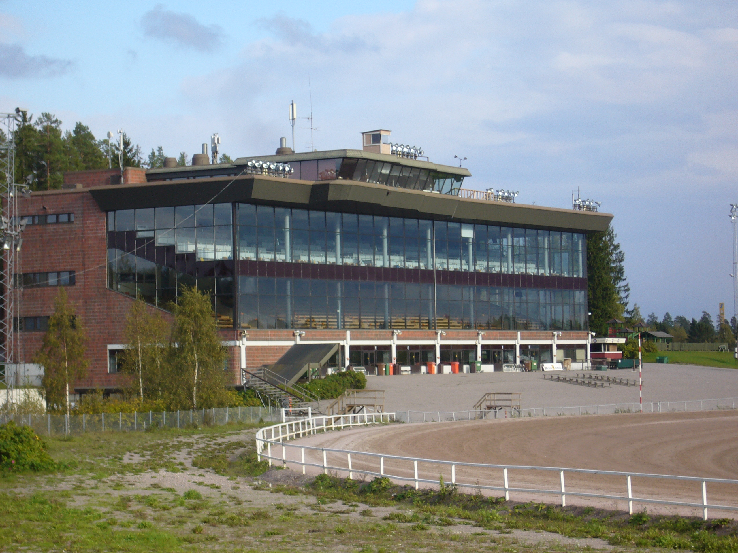 Jokimaan ravikeskus.